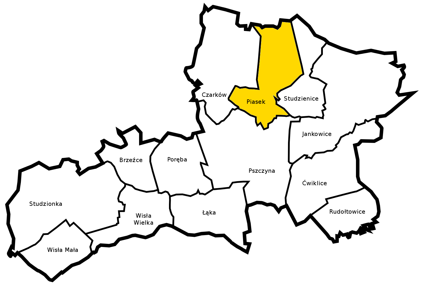 Gmina Pszczyna - sołectwo Piasek (Lasek w nazwie to pomyłka)